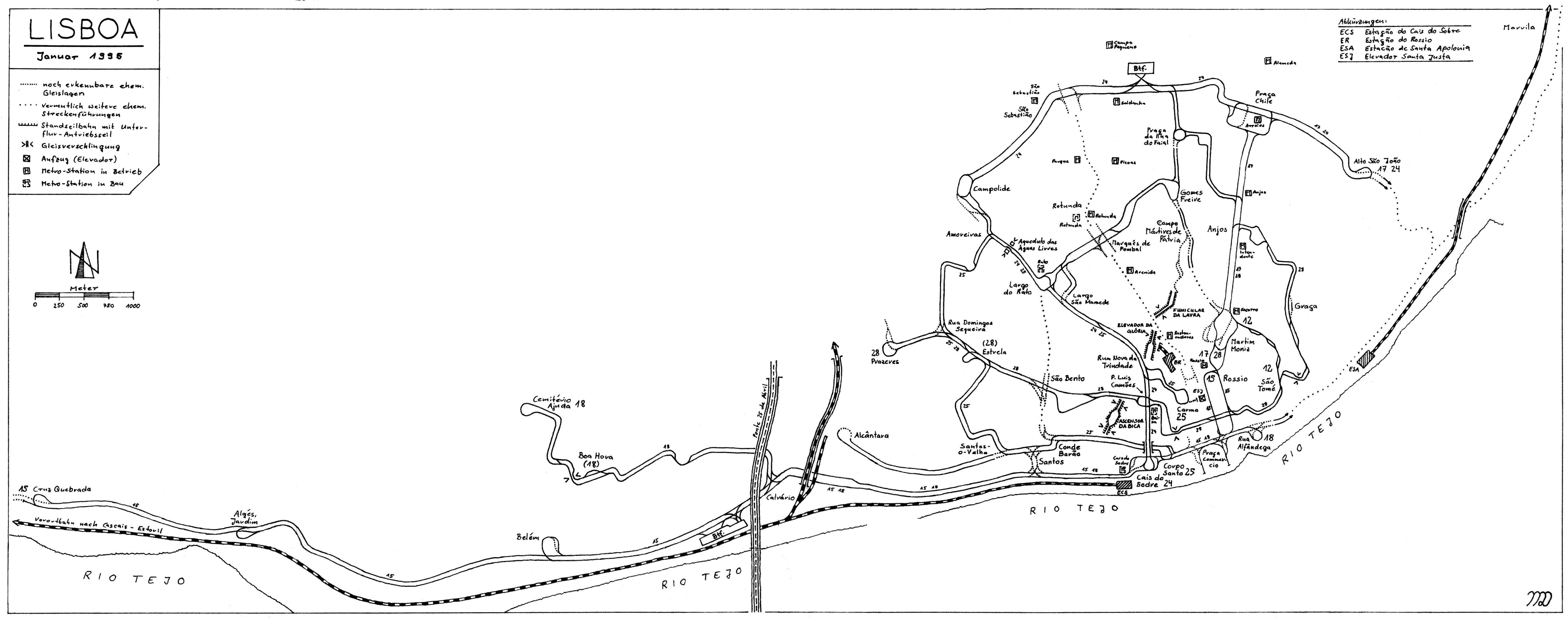 Tramvoja mapo pri Lisbono, 1995